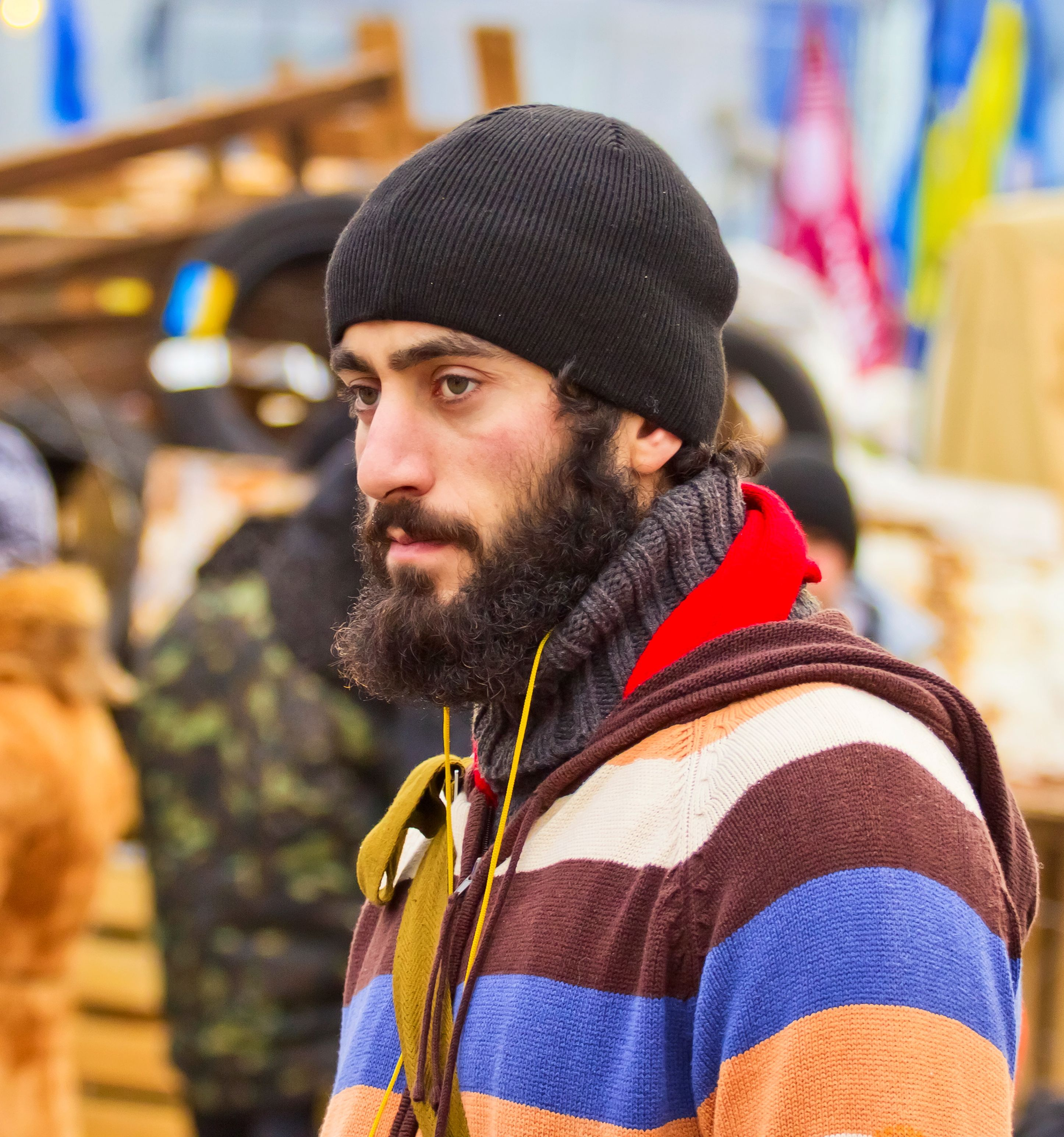 Сергей Нигоян. Первый погибший на Грушевского в Киеве.